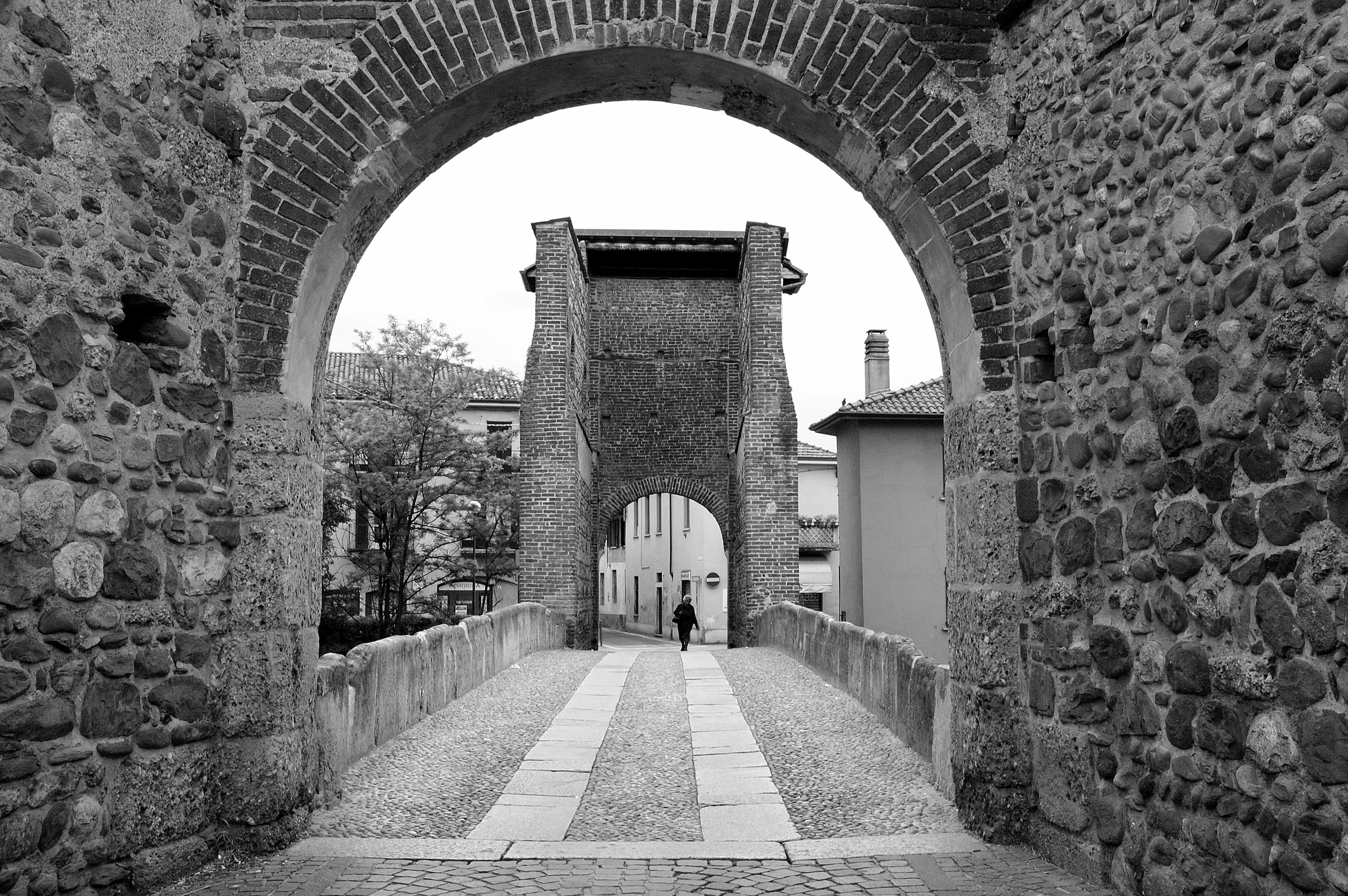 Ponte S.Rocco Vimercate